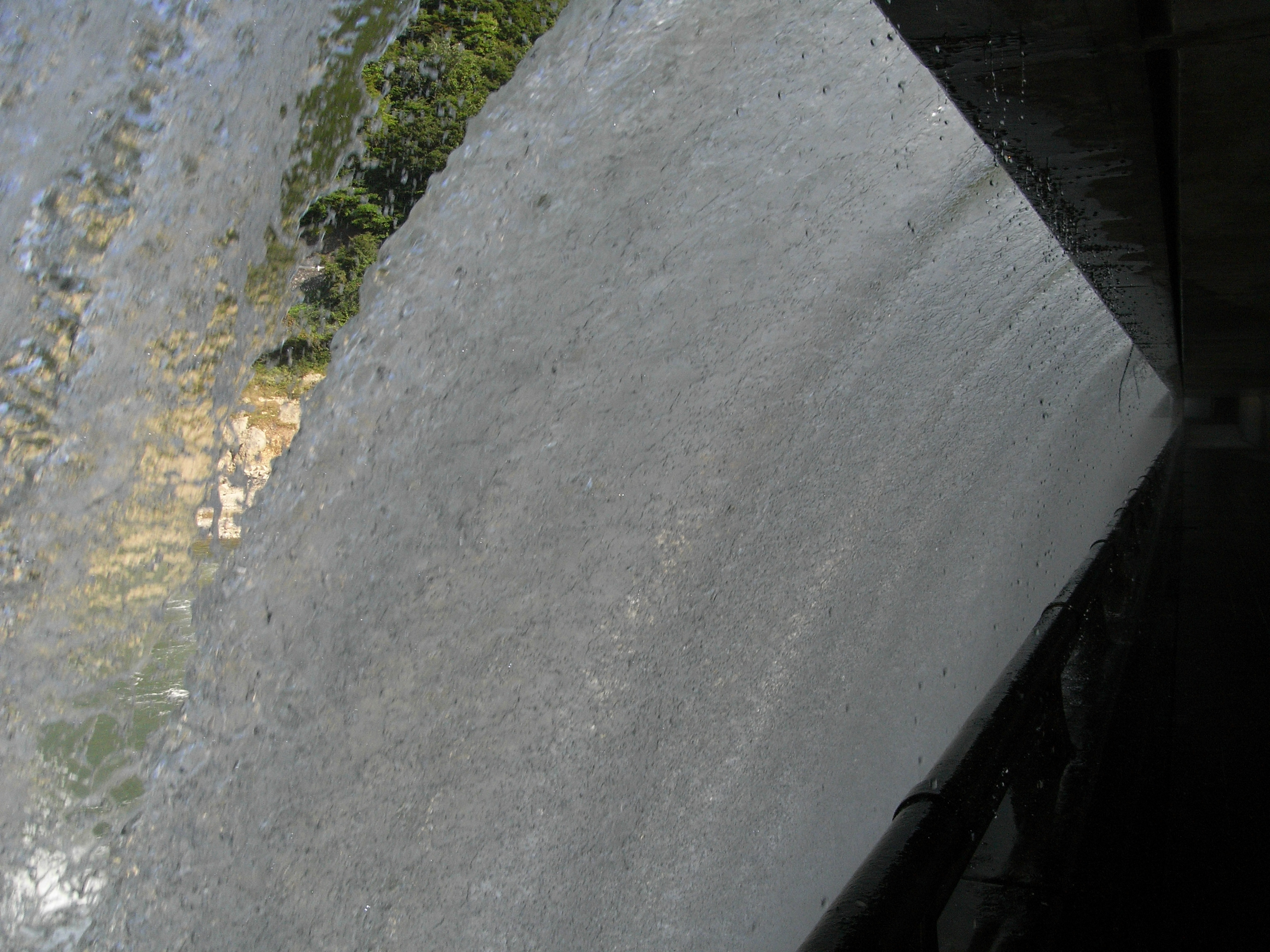 Dam